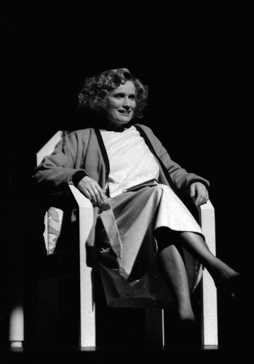 Théâtre Sorano. Le 14 Novembre 1987. Vue de Marie-Christine Barrault, assise dans un fauteuil sur scène, jouant la pièce, L'étrange intermède d'Eugène O'Neill, mis en scène par Jacques Rosner.